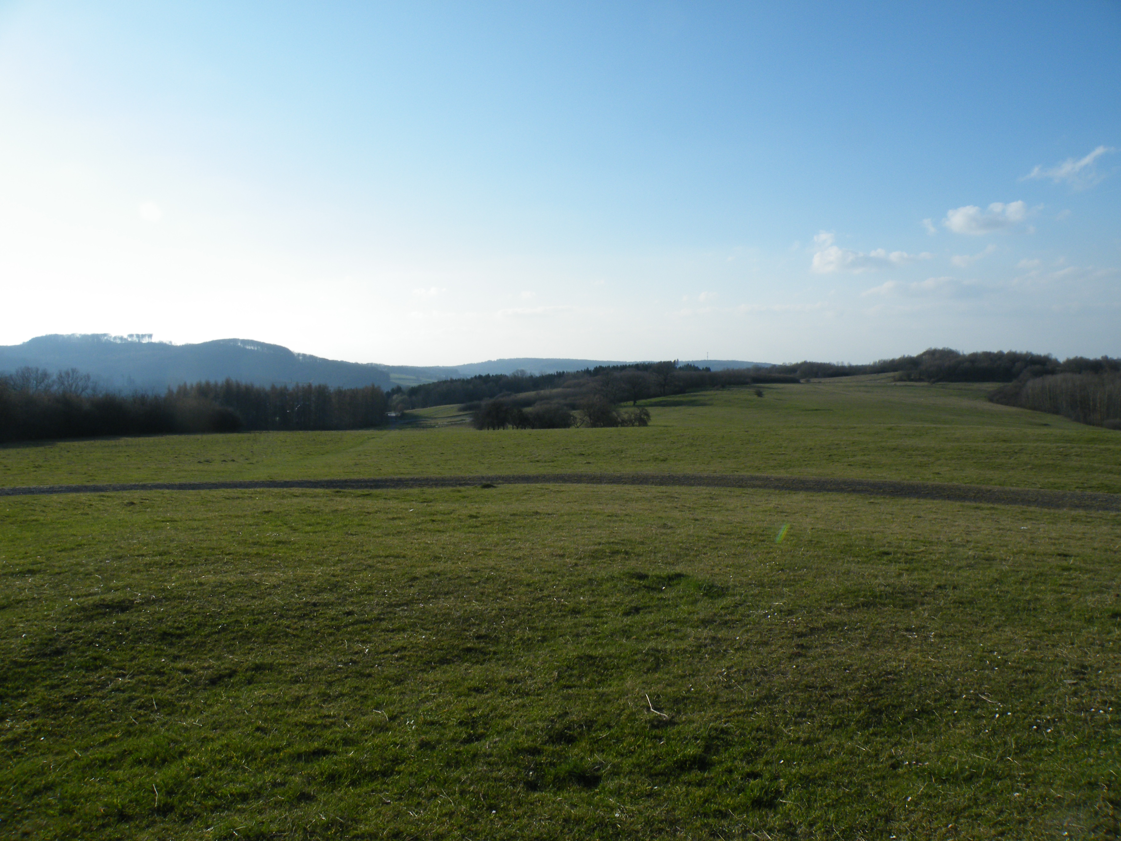 Grünland im Nordwestteil des Naturschutzgebiet Spreiberg.